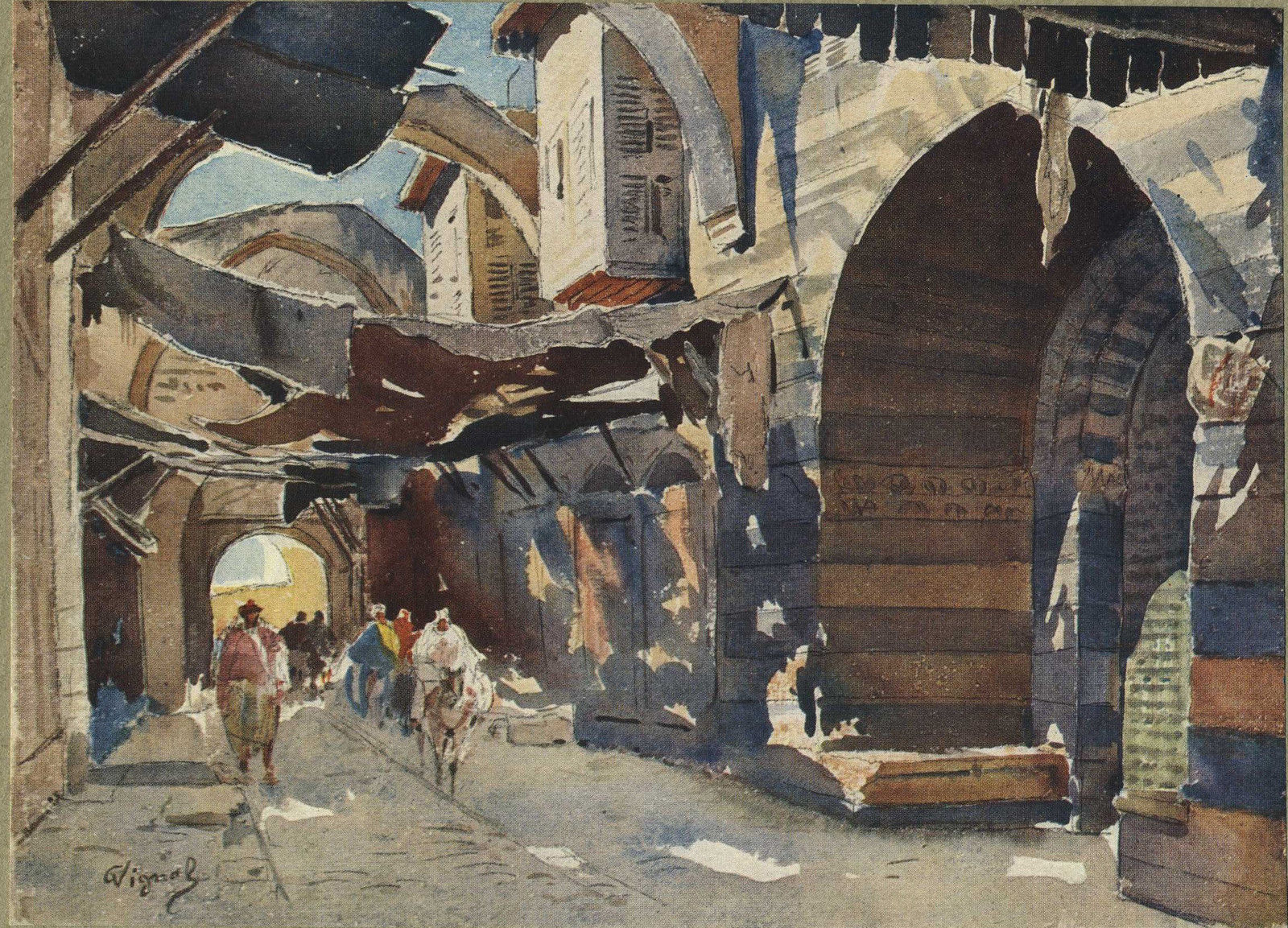 Vue du bazar d'Alep. Aquarelle de Pierre Vignal (1855-1925) en 1922.